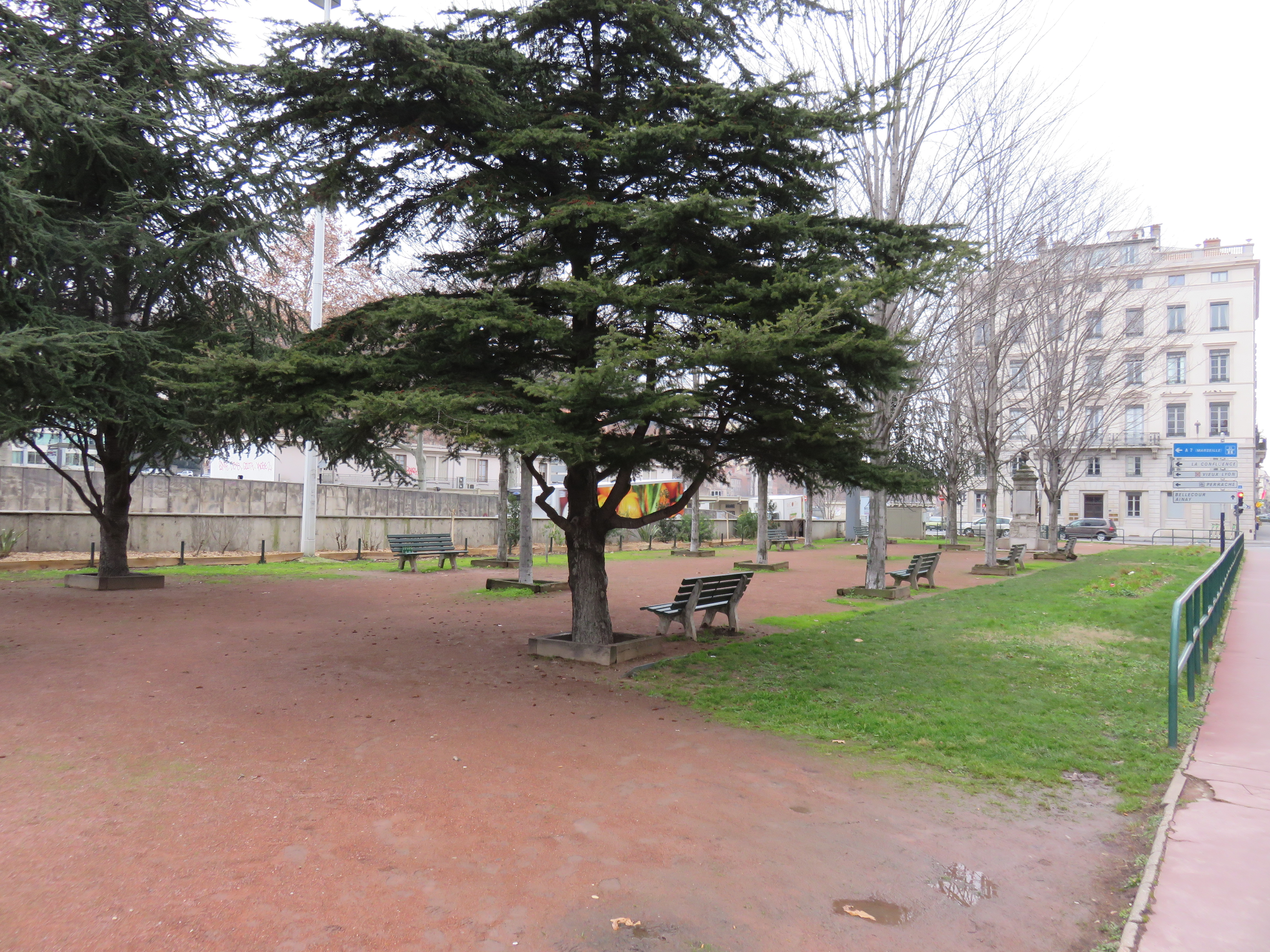 Vue de la place Gensoul dans le 2e arrondissement de Lyon.